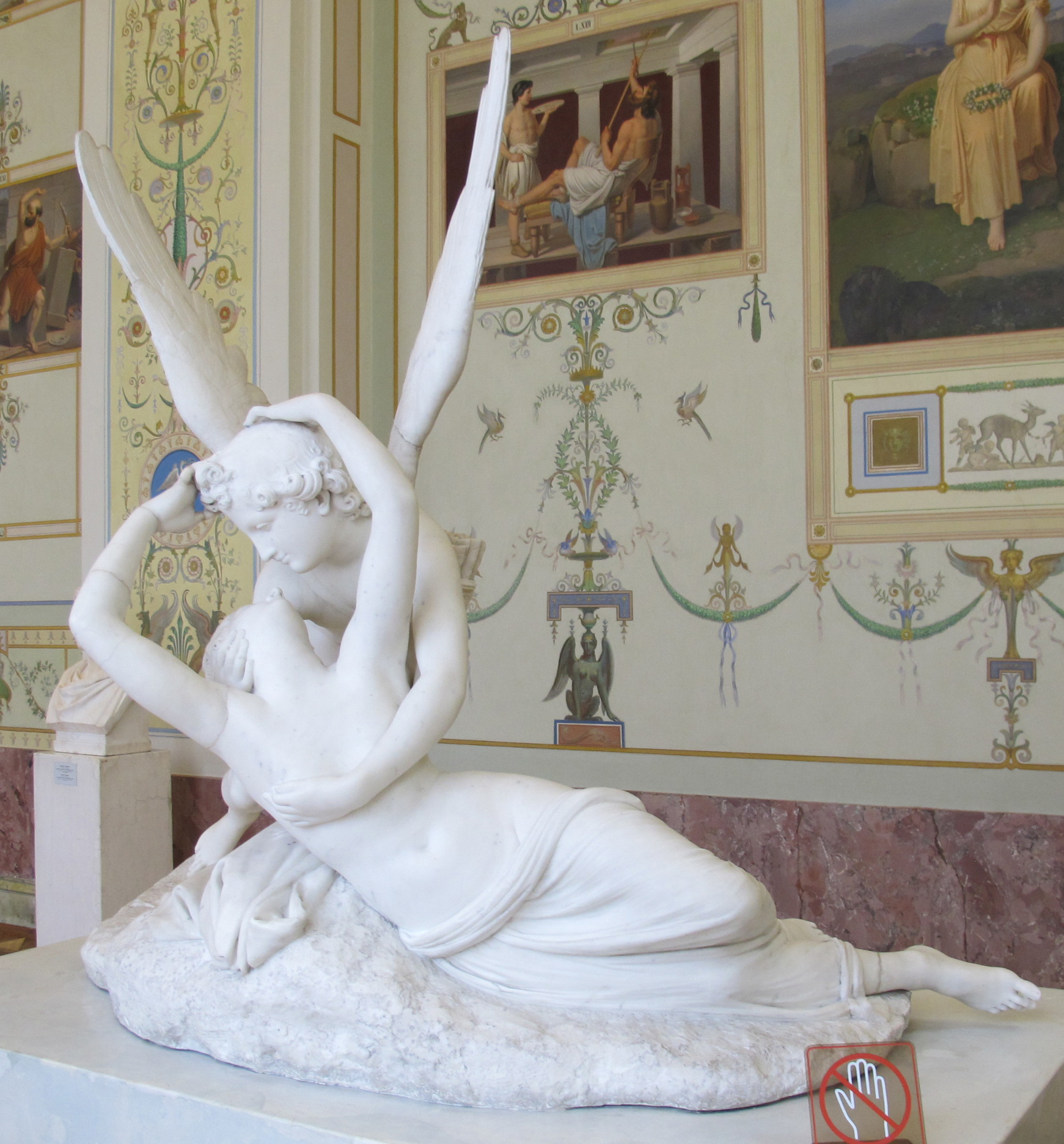 Antonio canova, amore e psiche, ermitage, 1794-1797